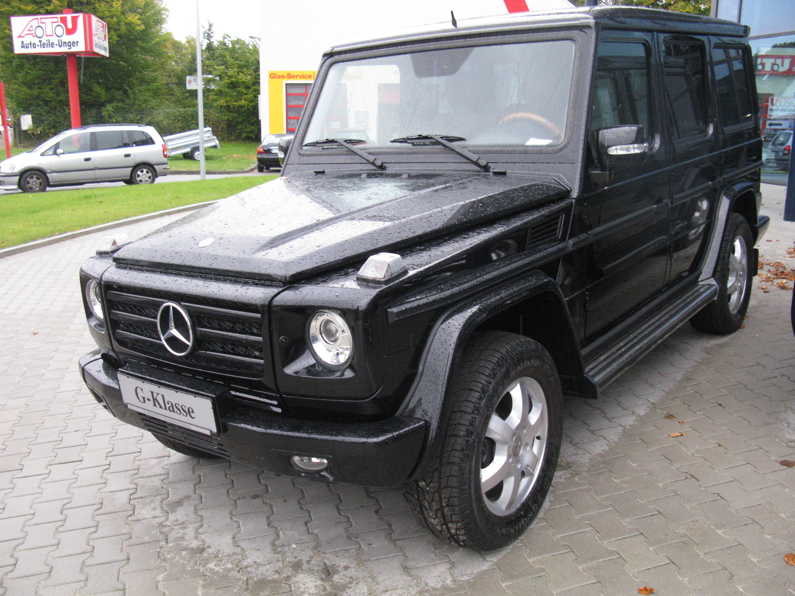 Mercedes-Benz Geländewagen